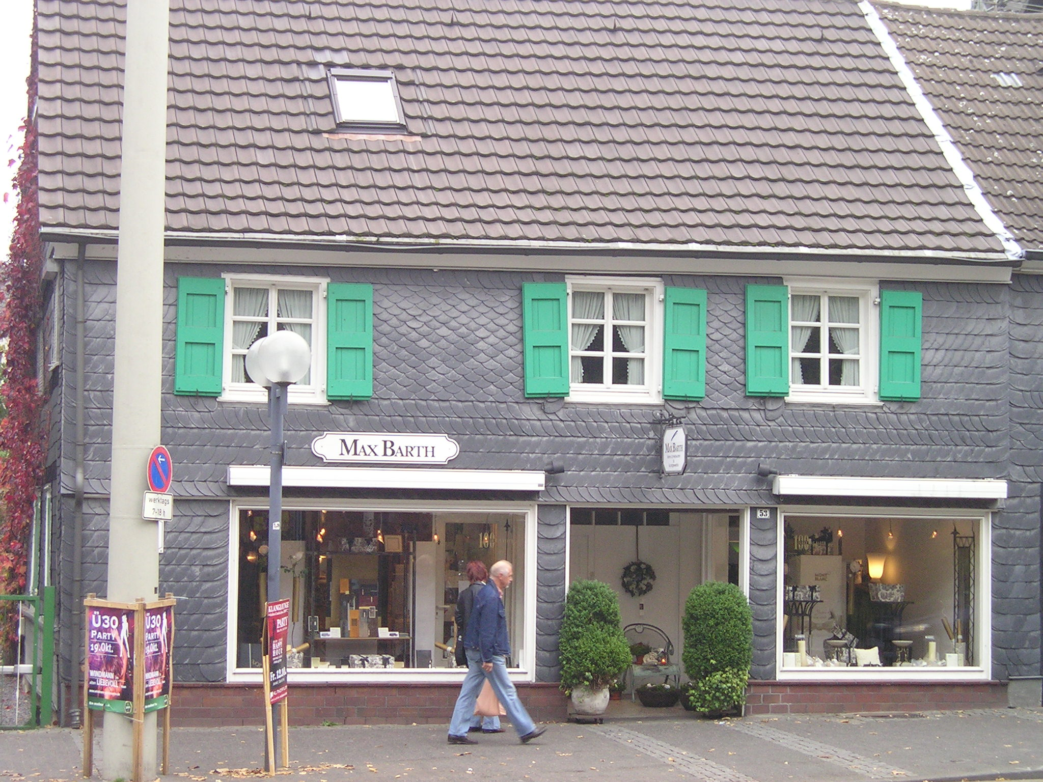 Barthhaus, Haan